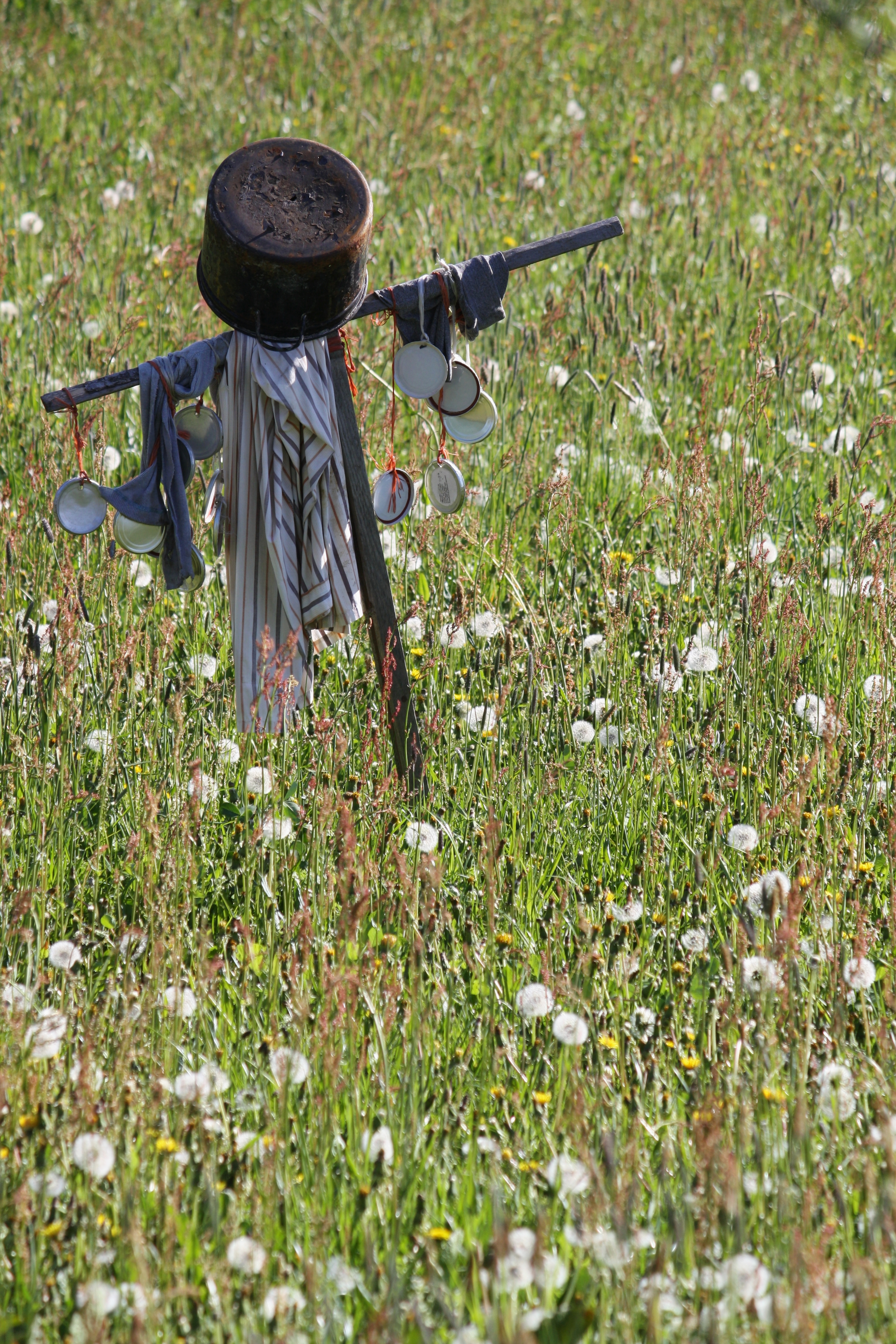 Štědrovice - strašák